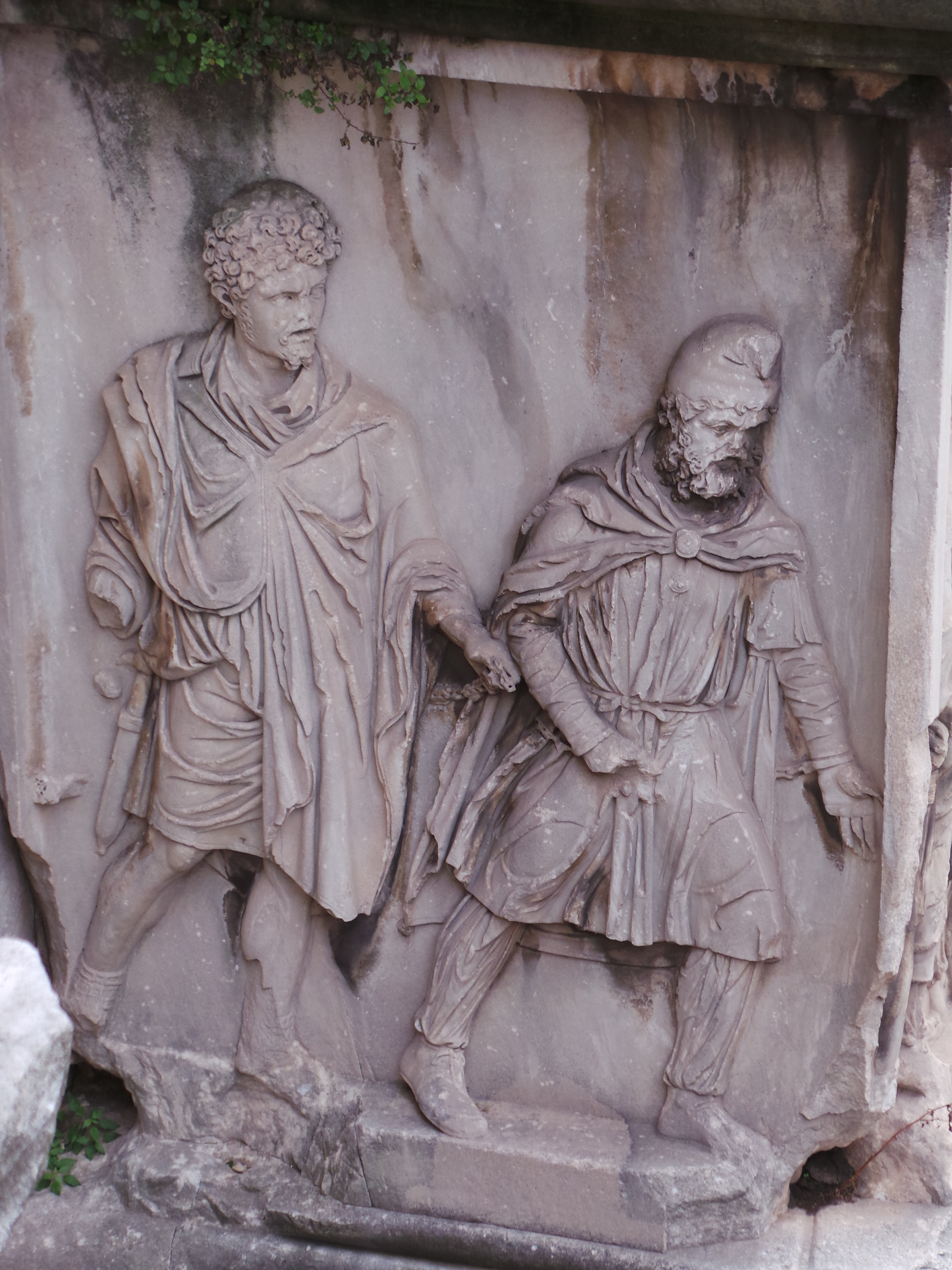 Septimius-Severus-Bogen; eine plastische Szenendarstellung von der Sistierung eines Kriegsgefangenen